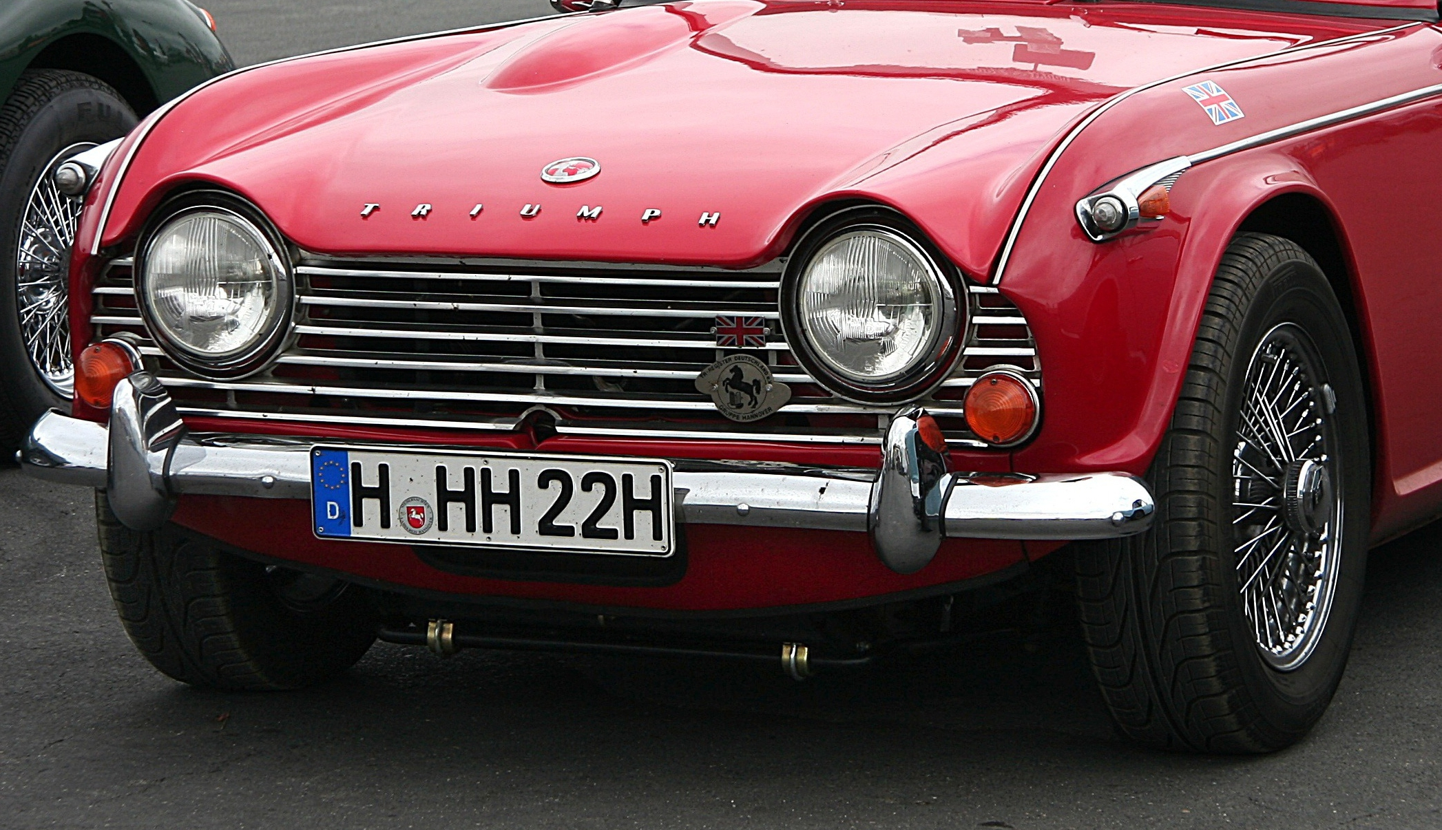 Front eines Triumph TR 4A, gebaut von 1965 bis 1967